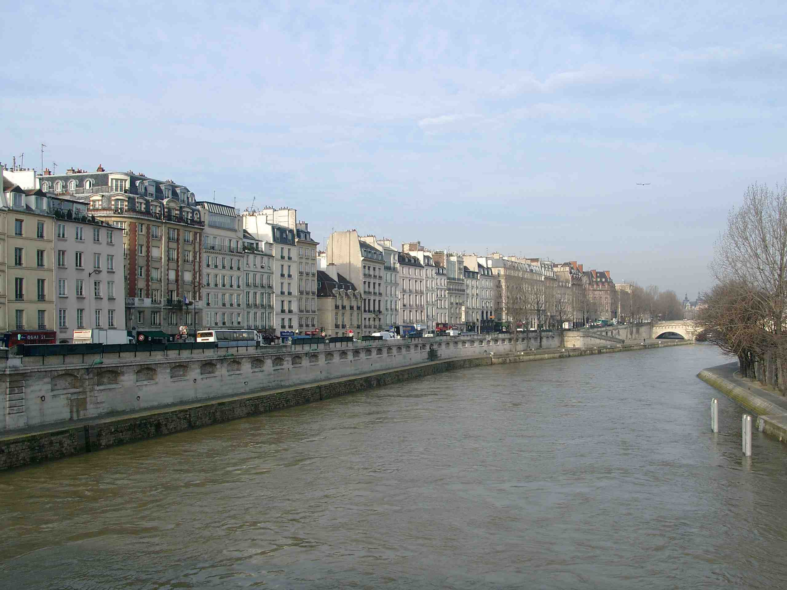 Paris, Quai des Grands Augustins, Position: Pont Neuf